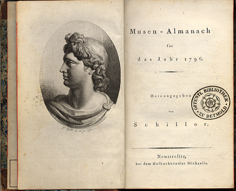 Title page of Friedrich Schillers Musen-Almanach für das Jahr 1796